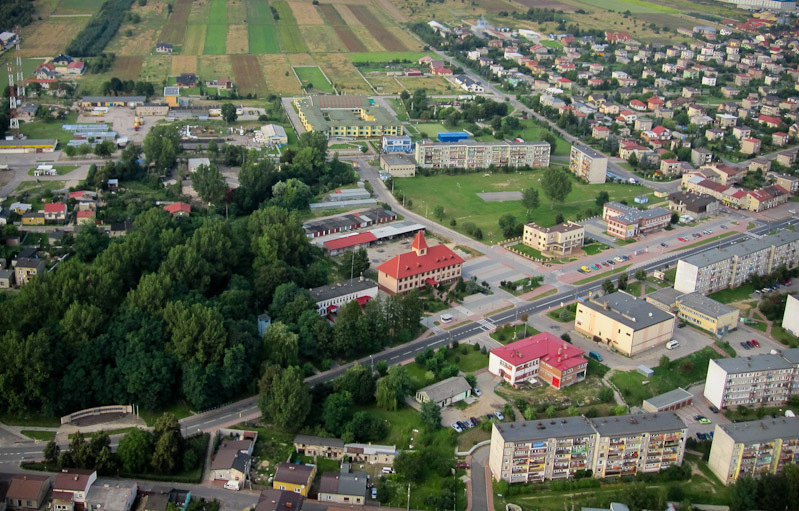 Działoszyn - ratusz z lotu ptaka